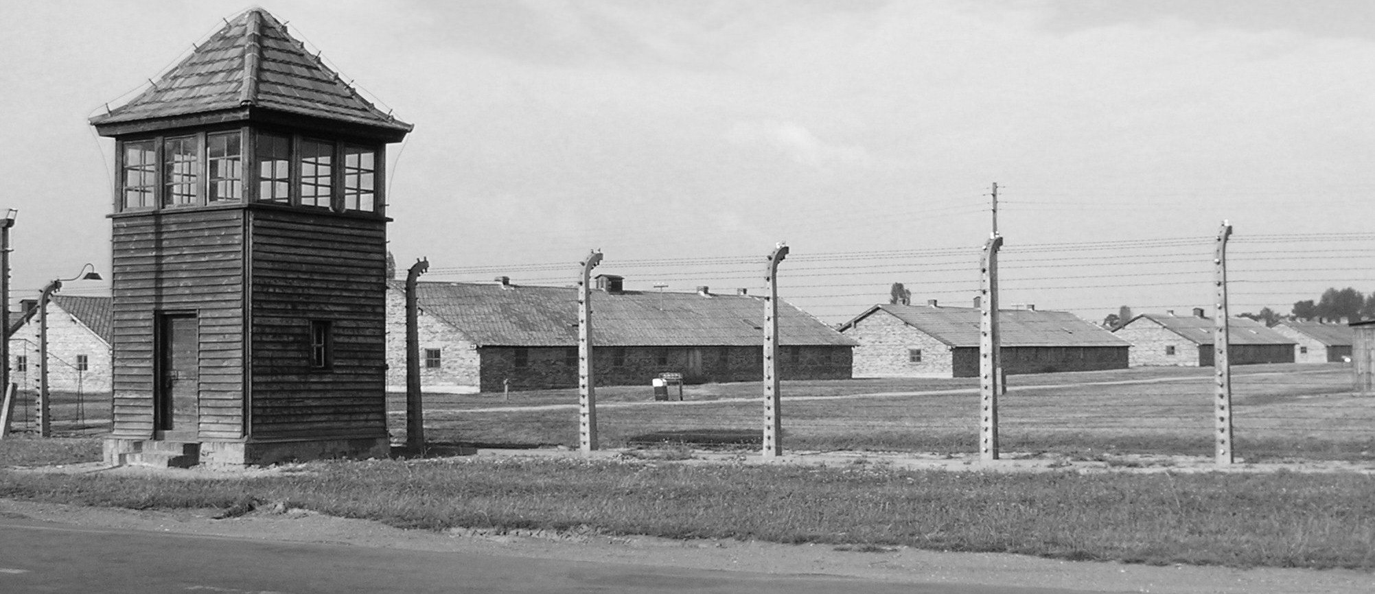 Birkenau Lager